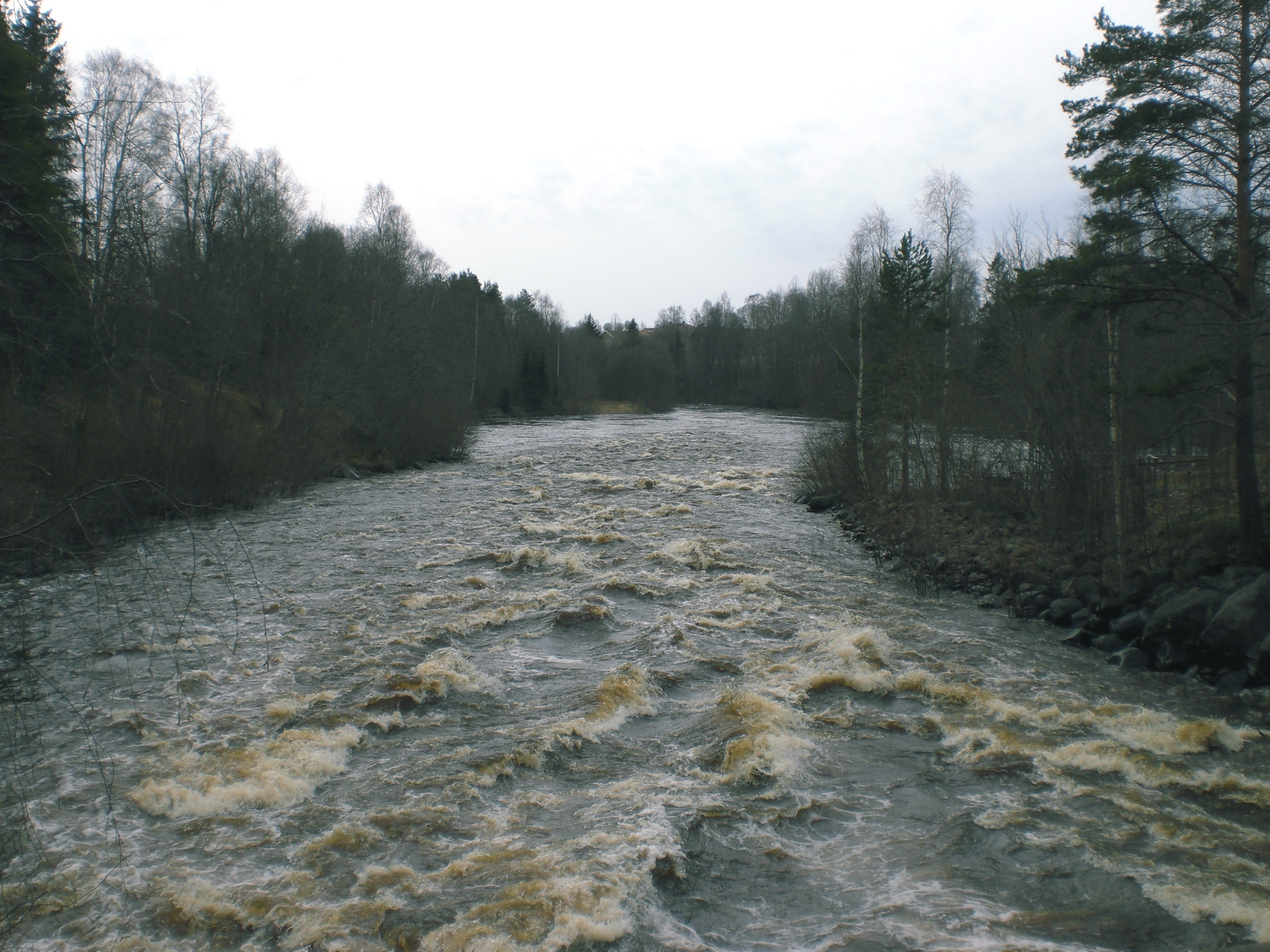 vårflod i Sävarån, fotat från Maskinåbron (Sävar River at spring)